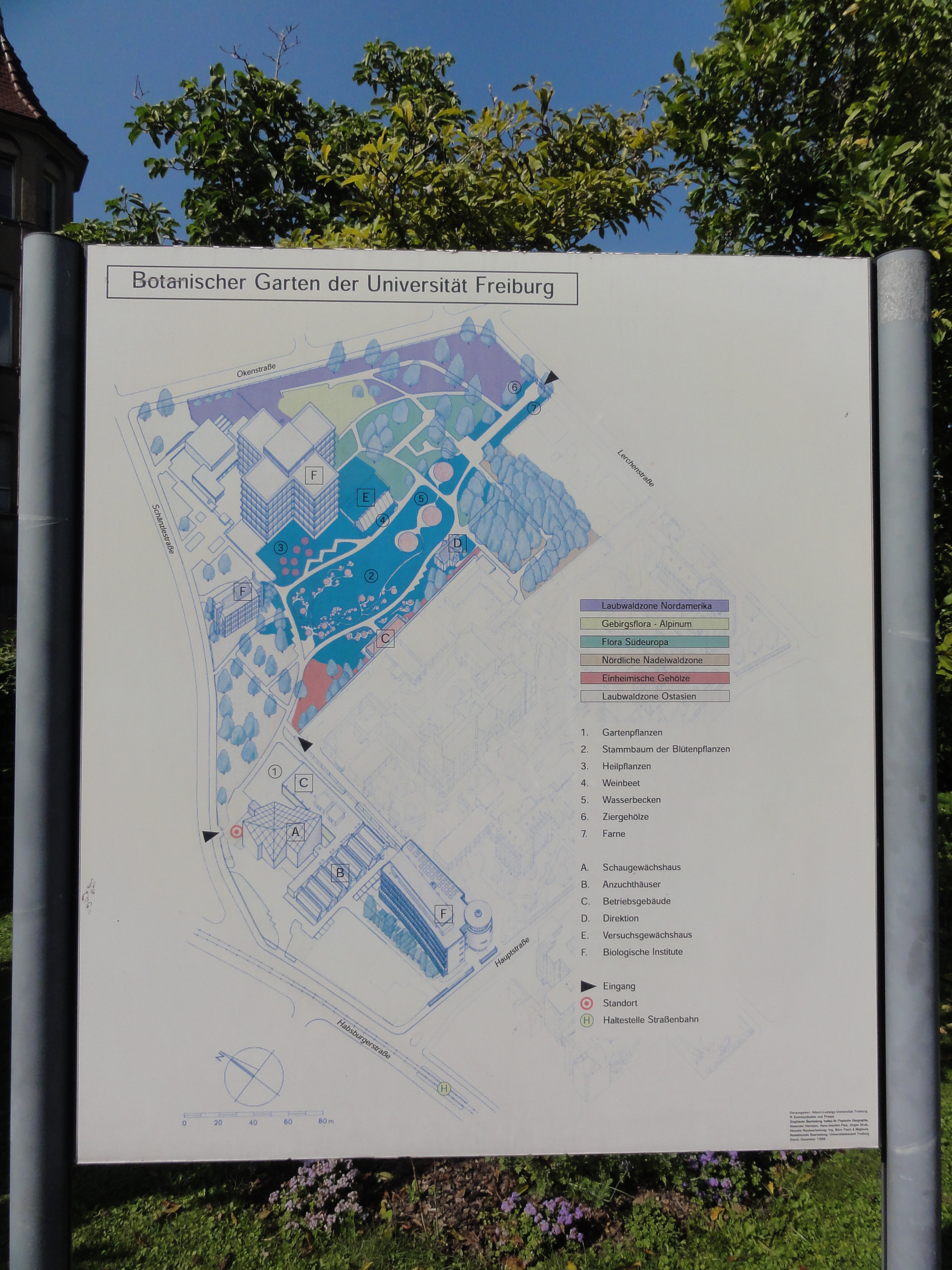 Freiburg im Breisgau, Germany